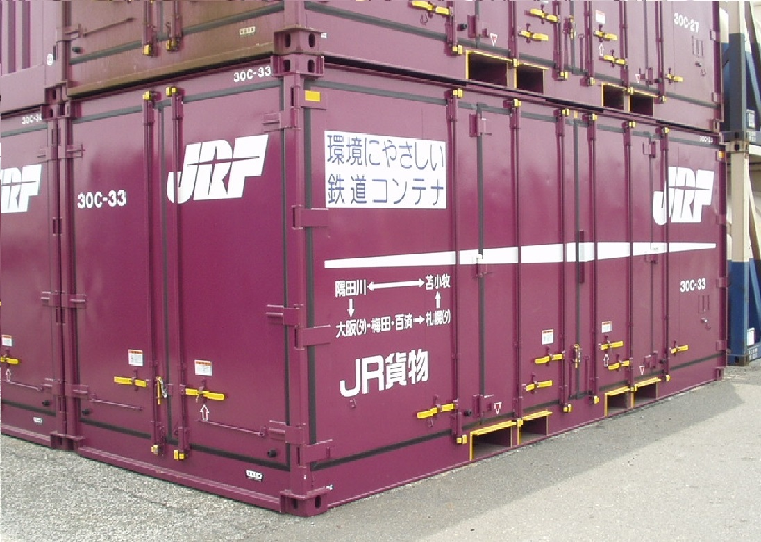 撮影地＝【大阪(タ)】